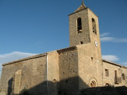 L’església de L'Ametlla de Segarra (Montoliu de Segarra) és un exemplar del romànic rural de la Catalunya interior, senzill i rústic, construïda al segle XII.